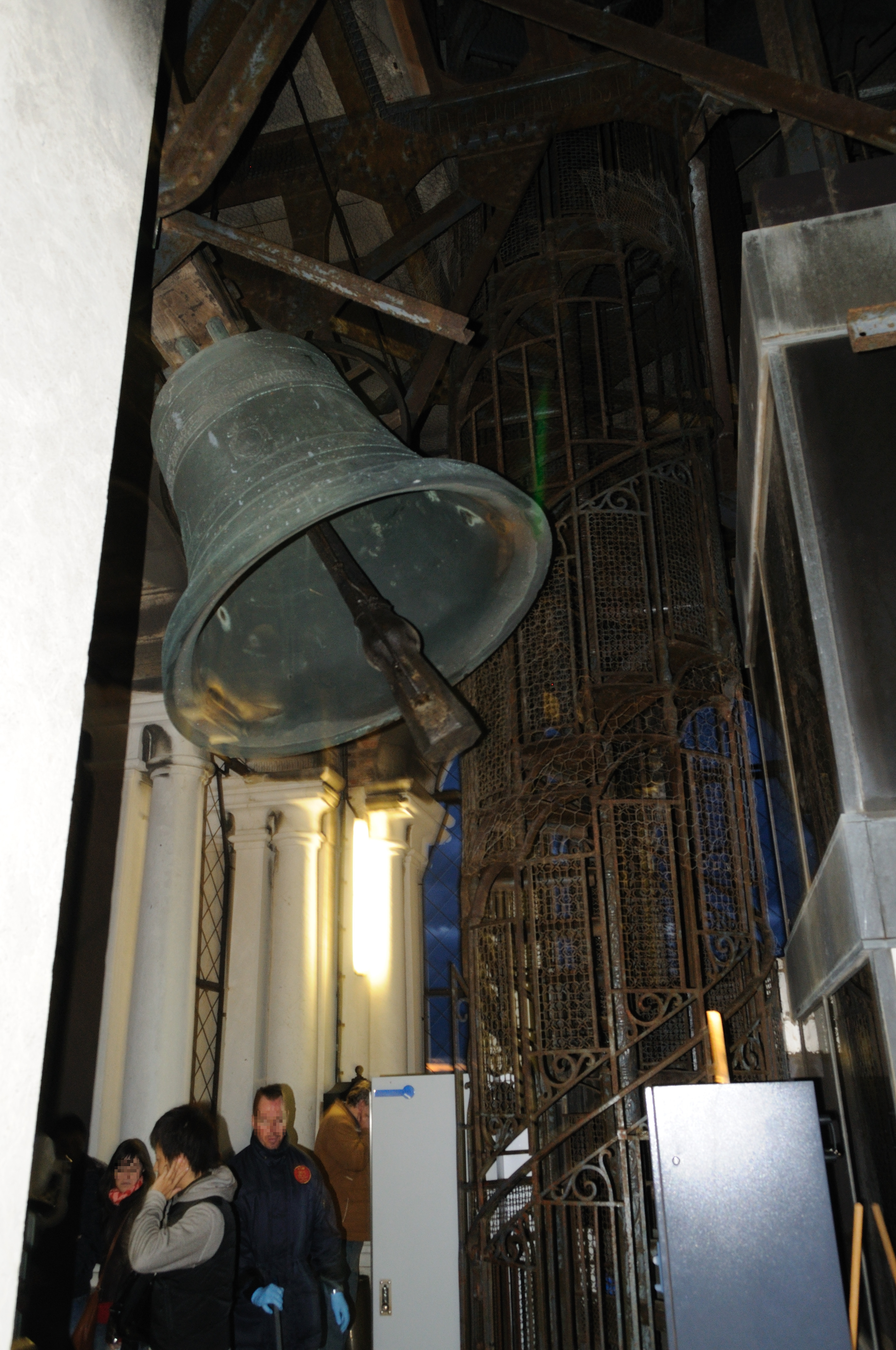 ベネチア サン・マルコの鐘楼の鐘室